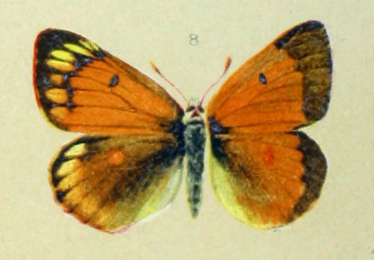 Colias hecla sulitelma Arnold Spuler: Die Schmetterlinge Europas. 3, E. Schweitzerbartsche Verlagsbuchhandlung, Stuttgart 1910.